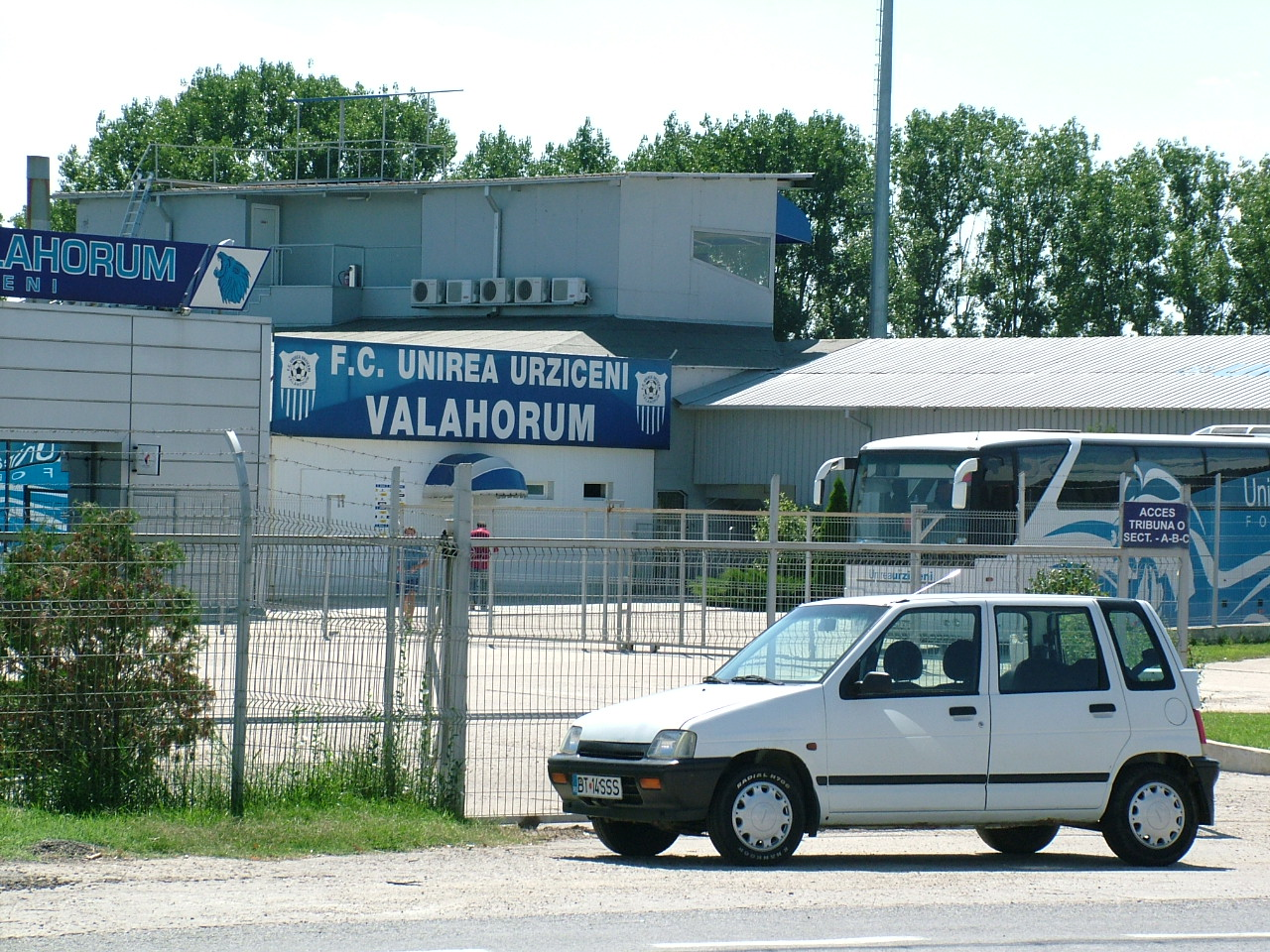 Intrare stadion